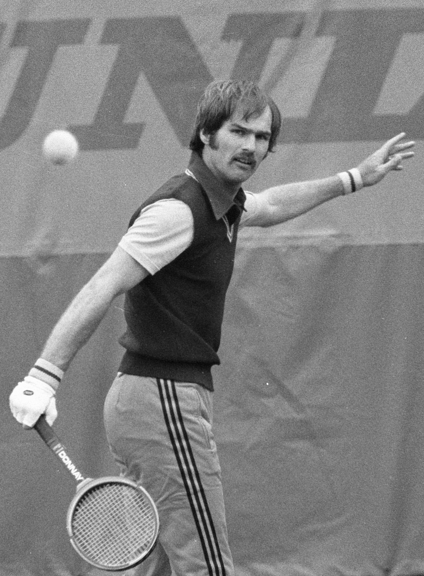 Davis-Cup 1977: Nederland-Joegoslavië. De Nederlandse speler Fred Hemmes in actie